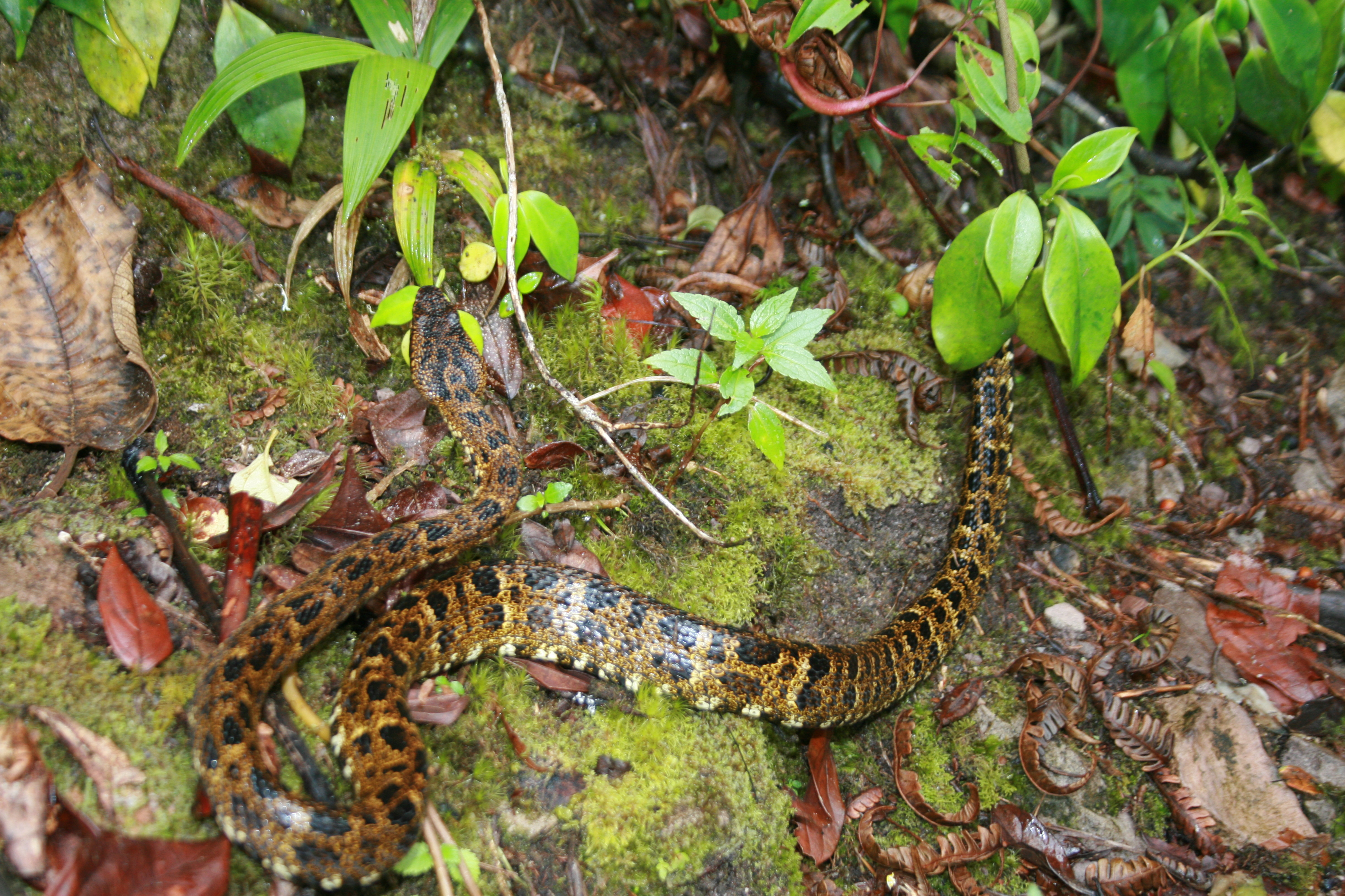 J'ai photographié ce reptile au sud-est du Venezuela dans le Tépuis du Roraïma (alt. 2200 m)dans une zone très humide. Environ 1 m de long, il agitait l'extrémité de sa queue (8/10 cm)à la façon d'un serpent à sonnette (bruit faible). Je dispose d'autres photos dont une de sa tête de profil. Je souhaiterai identifier cette espèce et vous remercie de l'aide que vous pourrez m'apporter.